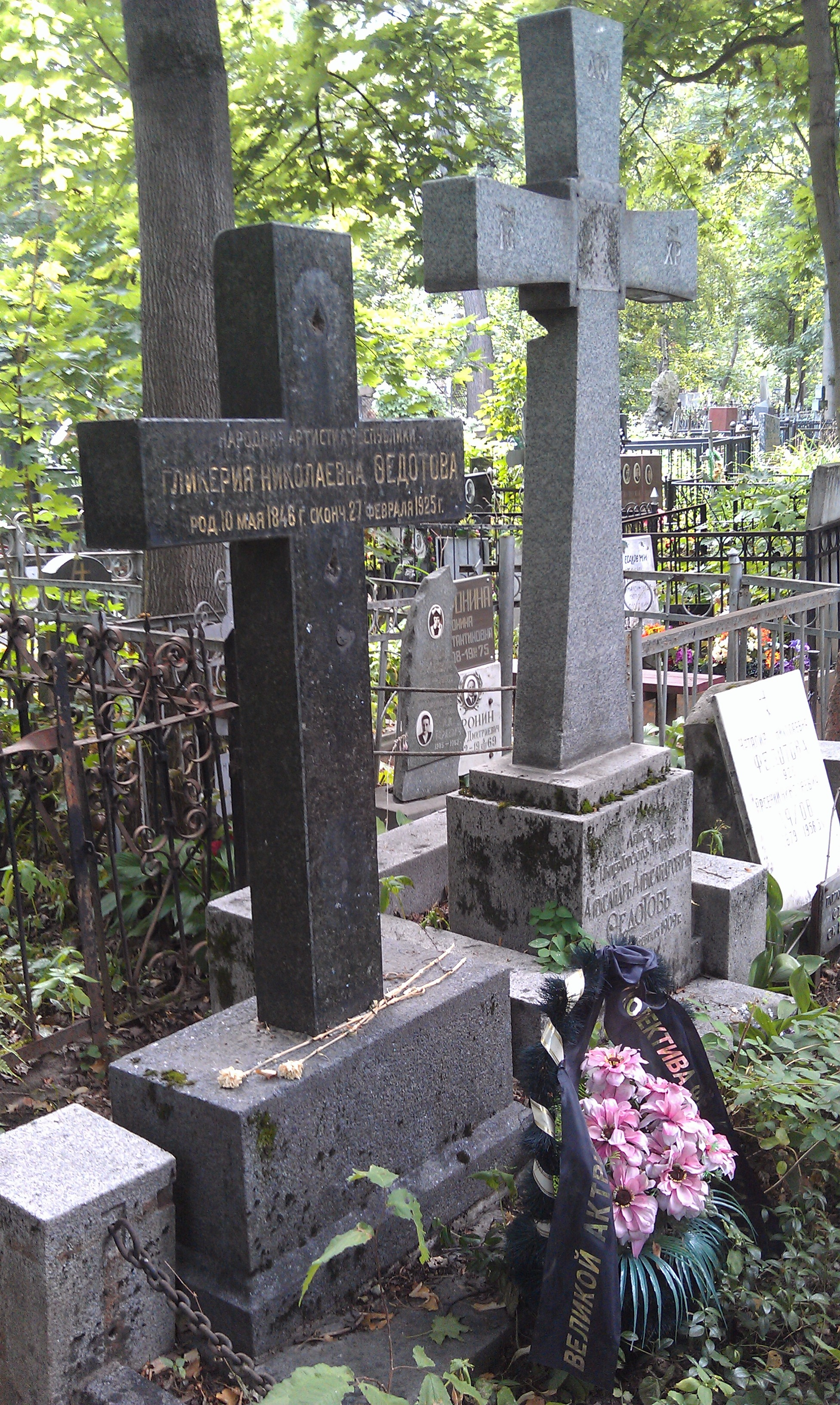 фото надгробия на могиле артистки Малого театра Гликерии Федотовой